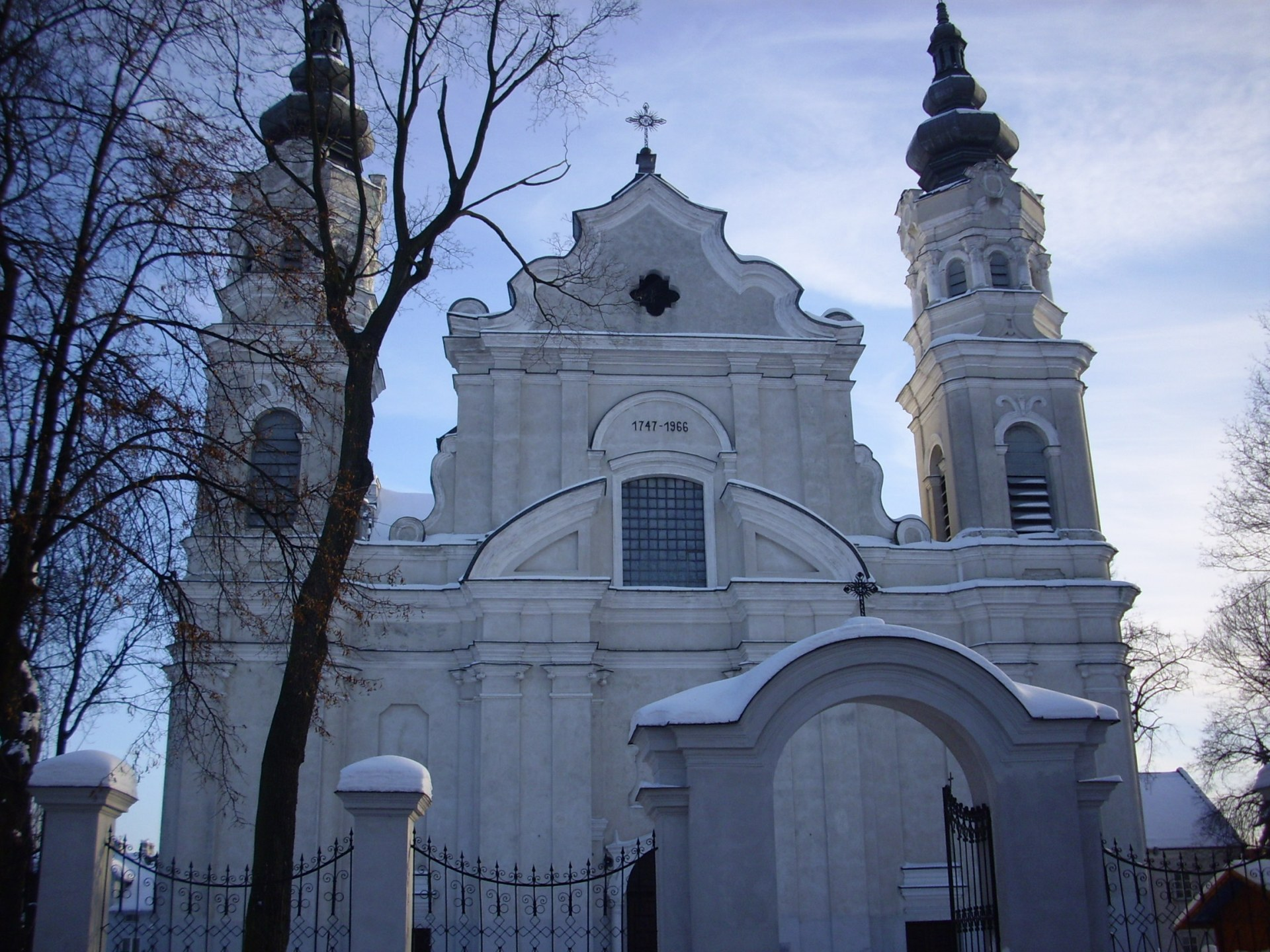 Biała Podlaska. Kościół pw. Narodzenia NMP (zabytek nr rejestr. A/131).